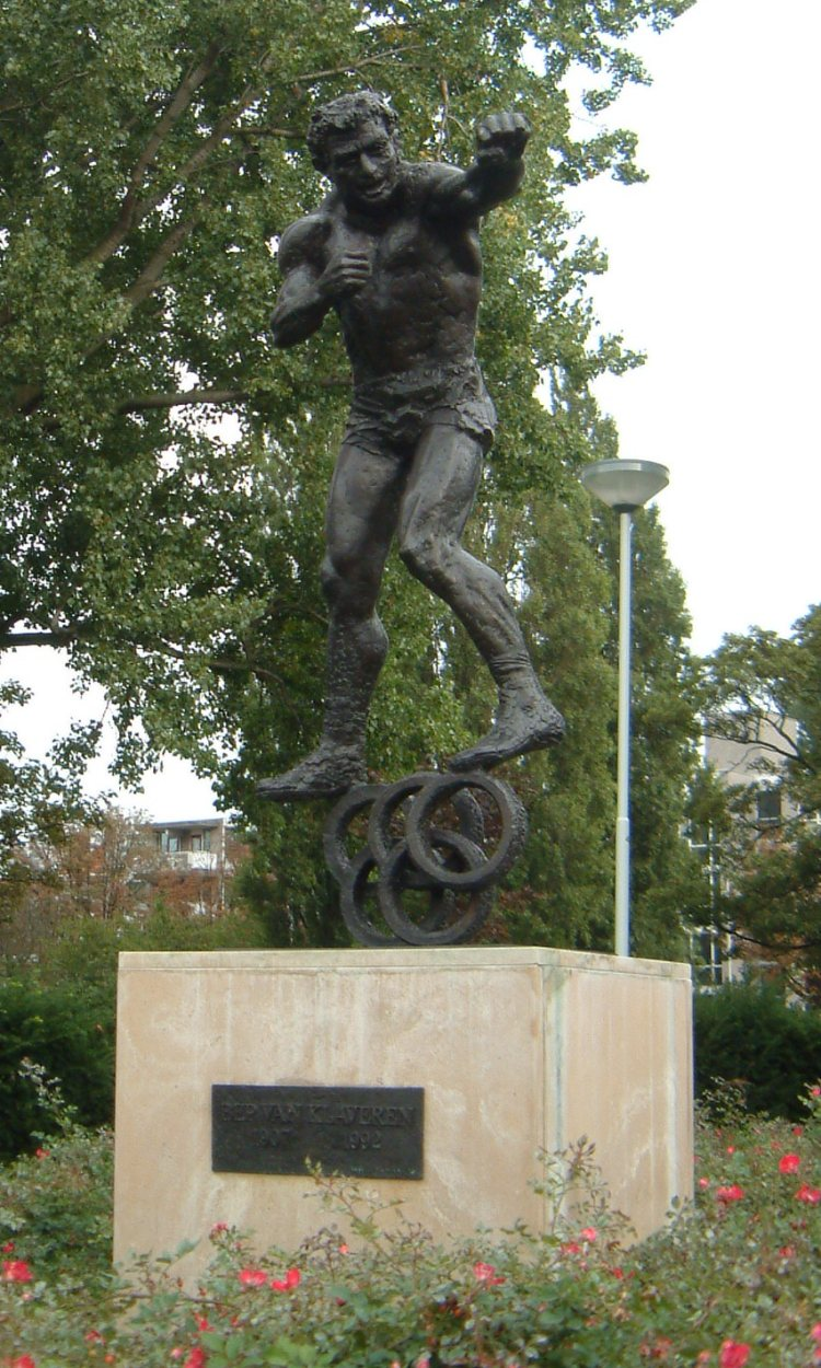 A bronze statue of Bep van Klaveren (1907-1992) in Rotterdam by Willem Verbon, unveiled 1992.